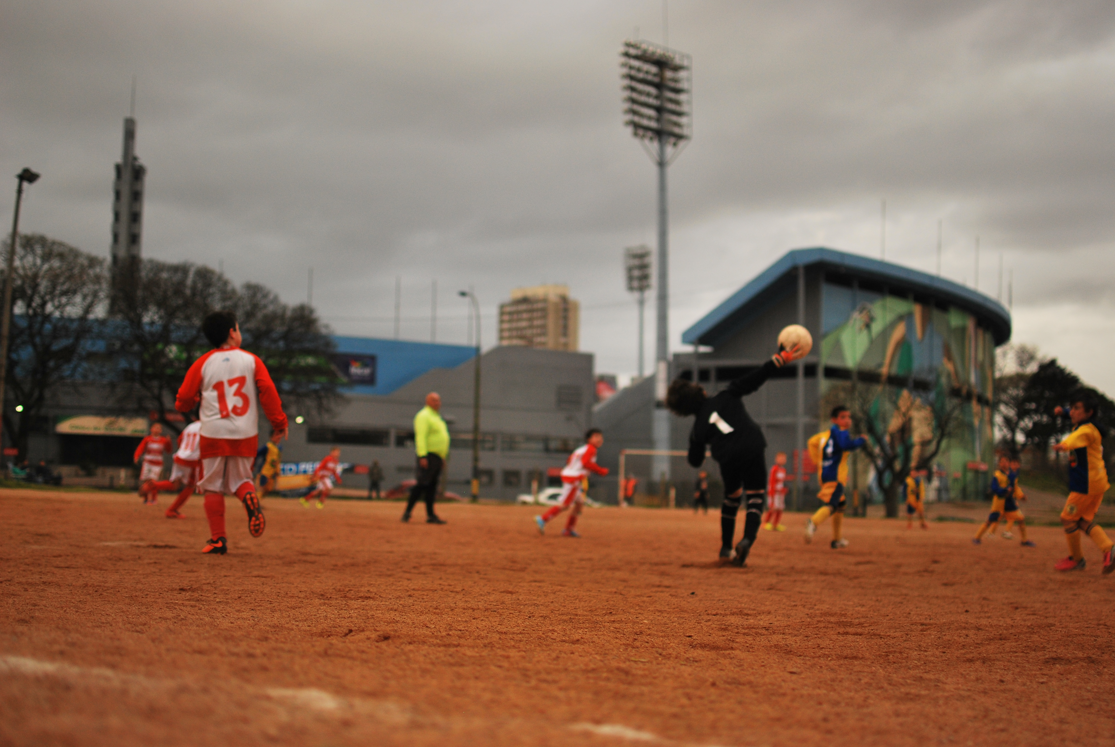 Trib. Homenaj. Est. Centenario. Ubicada en el departamento de Montevideo